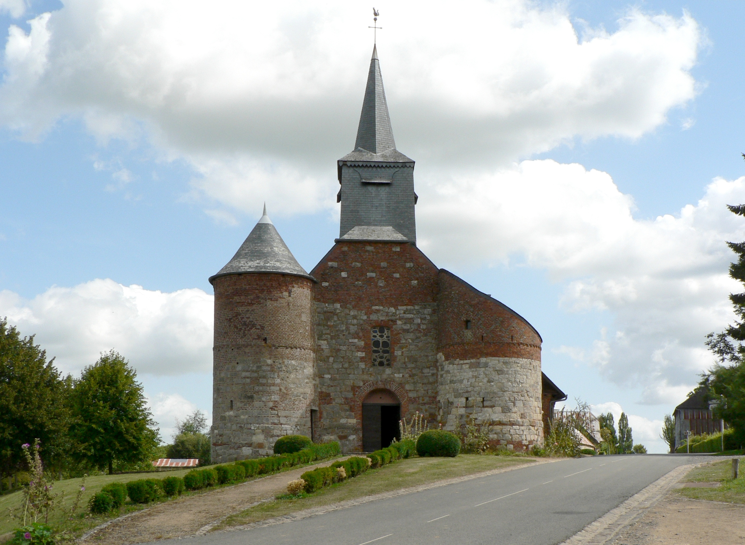 Église fortifiée de Bancigny, Aisne, France .